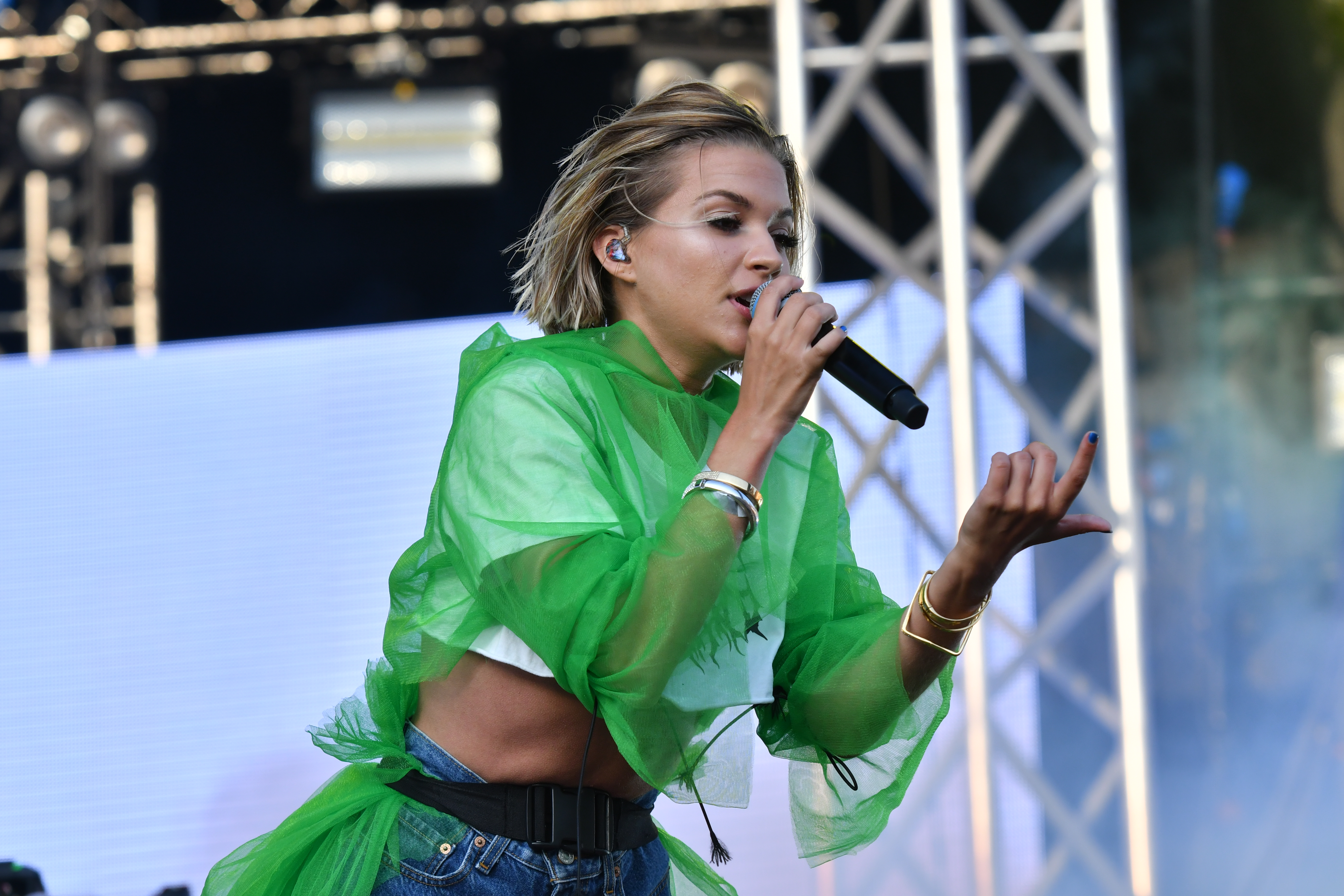 Tove Styrke på Malmöfestivalen 2018.